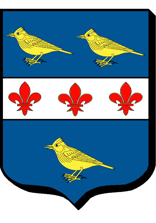 D'azur à la fasce d'argent chargée de trois fleurs de lys de gueules, accompagnée de trois alouettes d'or, 2 et 1.